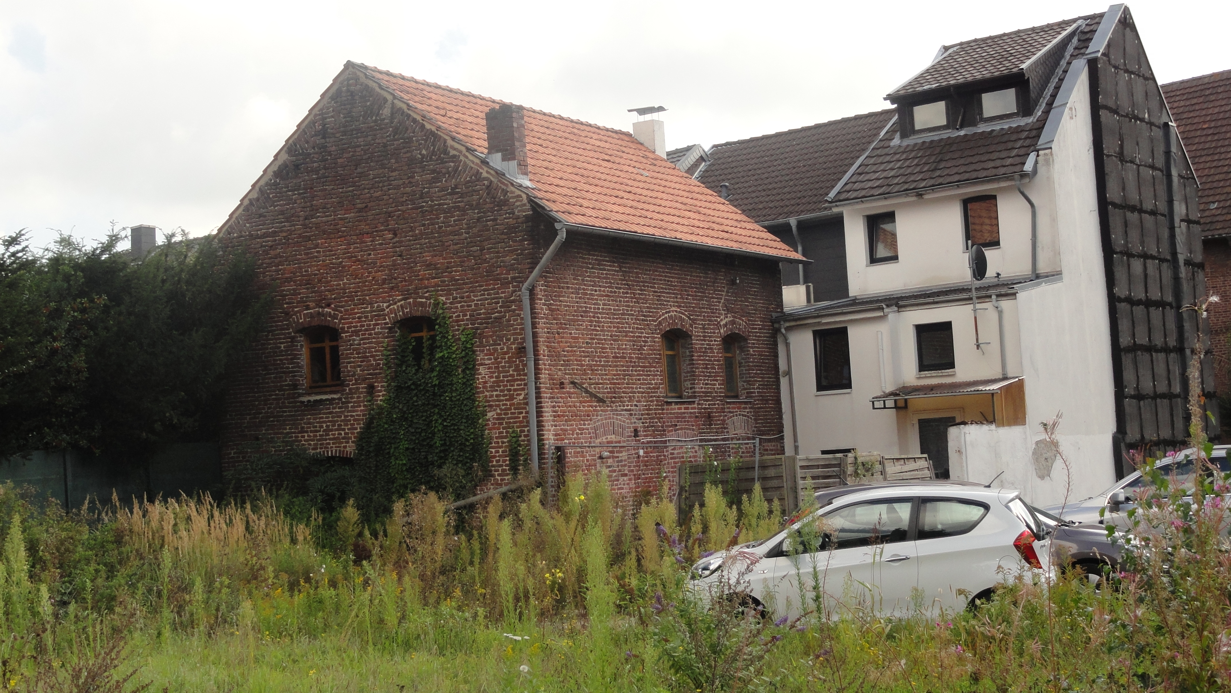 Die Gangelter Synagoge stammt von 1824 und wurde 1938 nicht angezündet, weil sie zu nahe an der anderen Bebauung stand ( Das Photo zeigt die Ansicht von WestenThis is a photograph of an architectural monument., no. 67